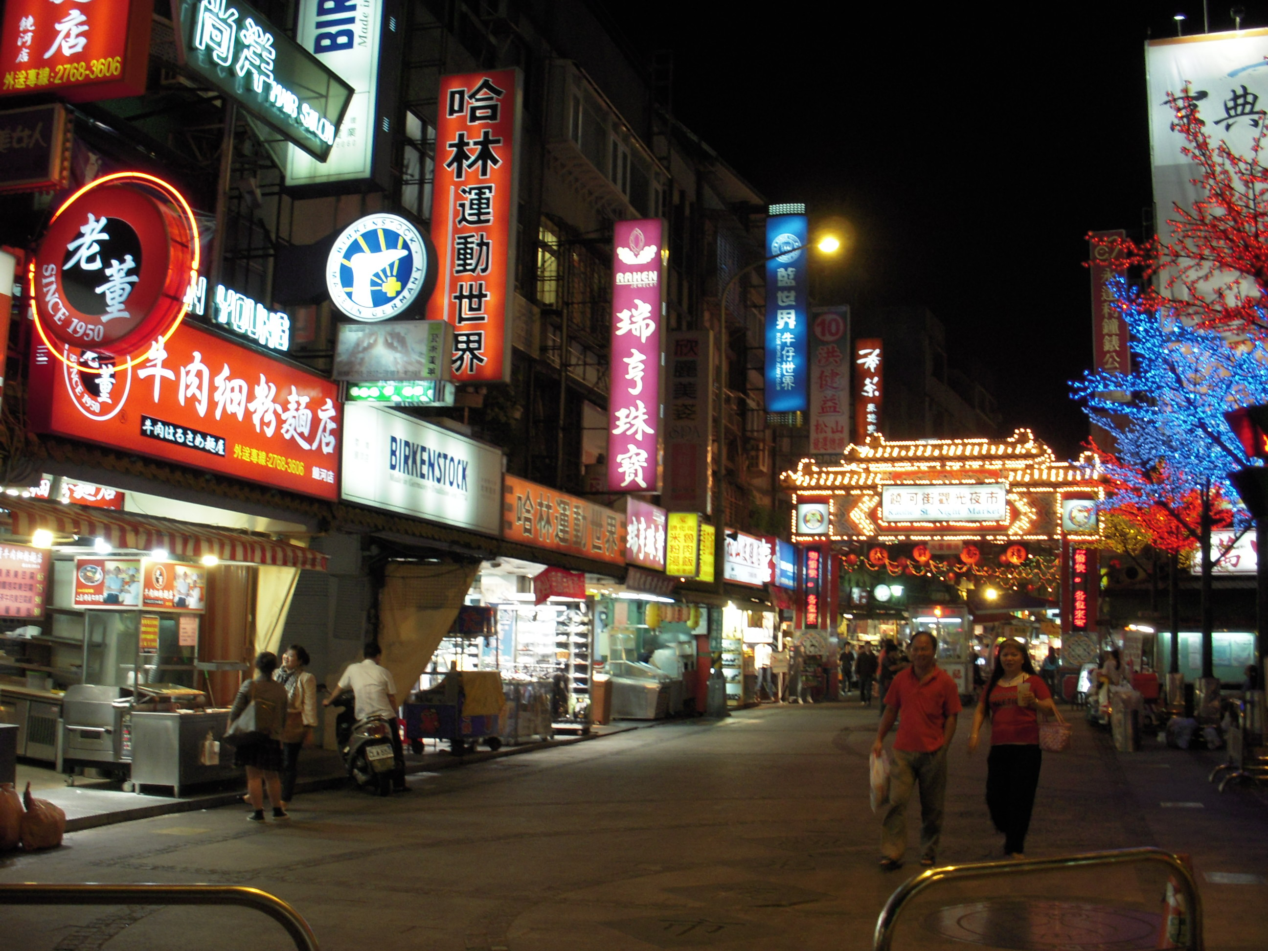 饒河夜市至京華城周邊夜景